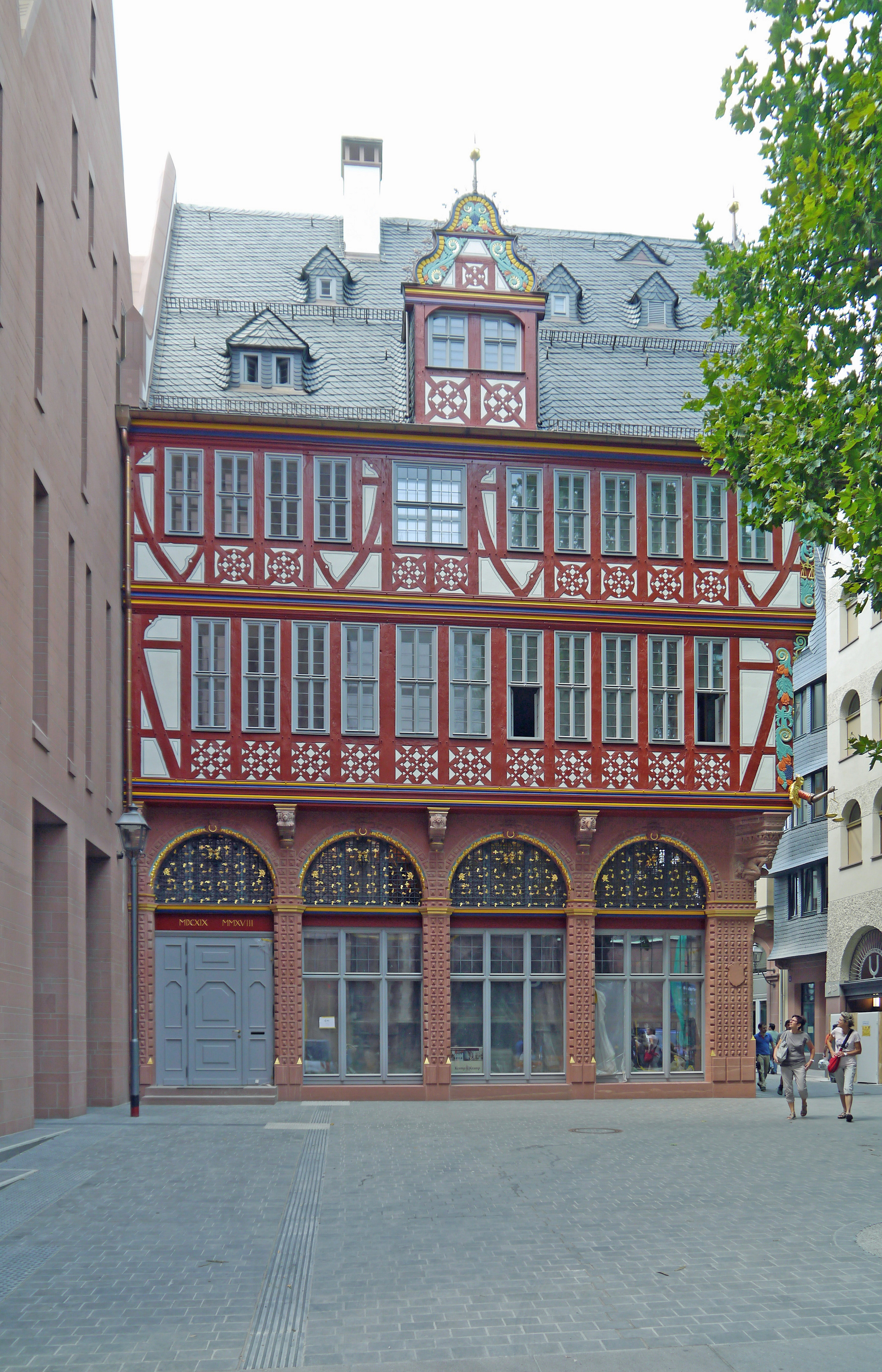 Haus Markt 5, Zur Goldenen Waage, 2018 vom Domplatz aus.